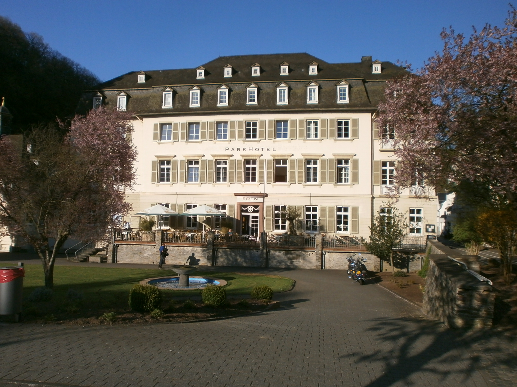 Parkhotel Bad Bertrich